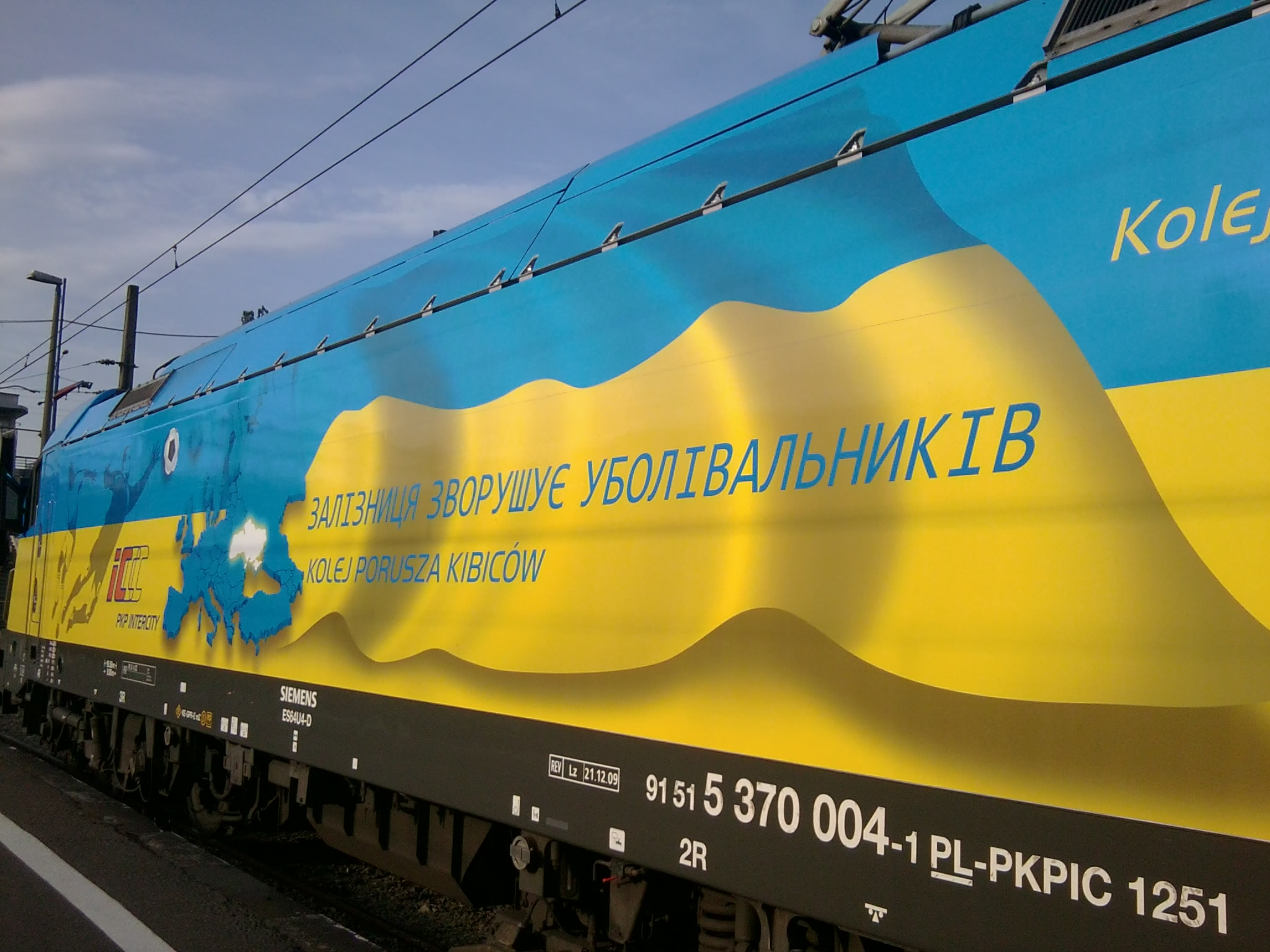 Kolej porusza kibiców w języku ukraińskim.